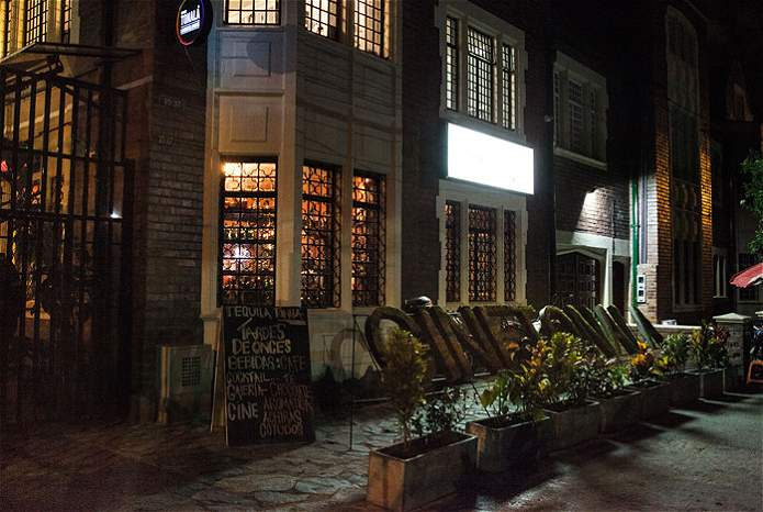 Cinema en Bogotá